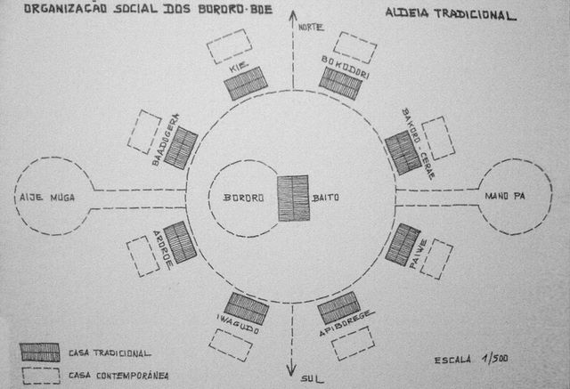 Organização espacial da comunidade Bororo